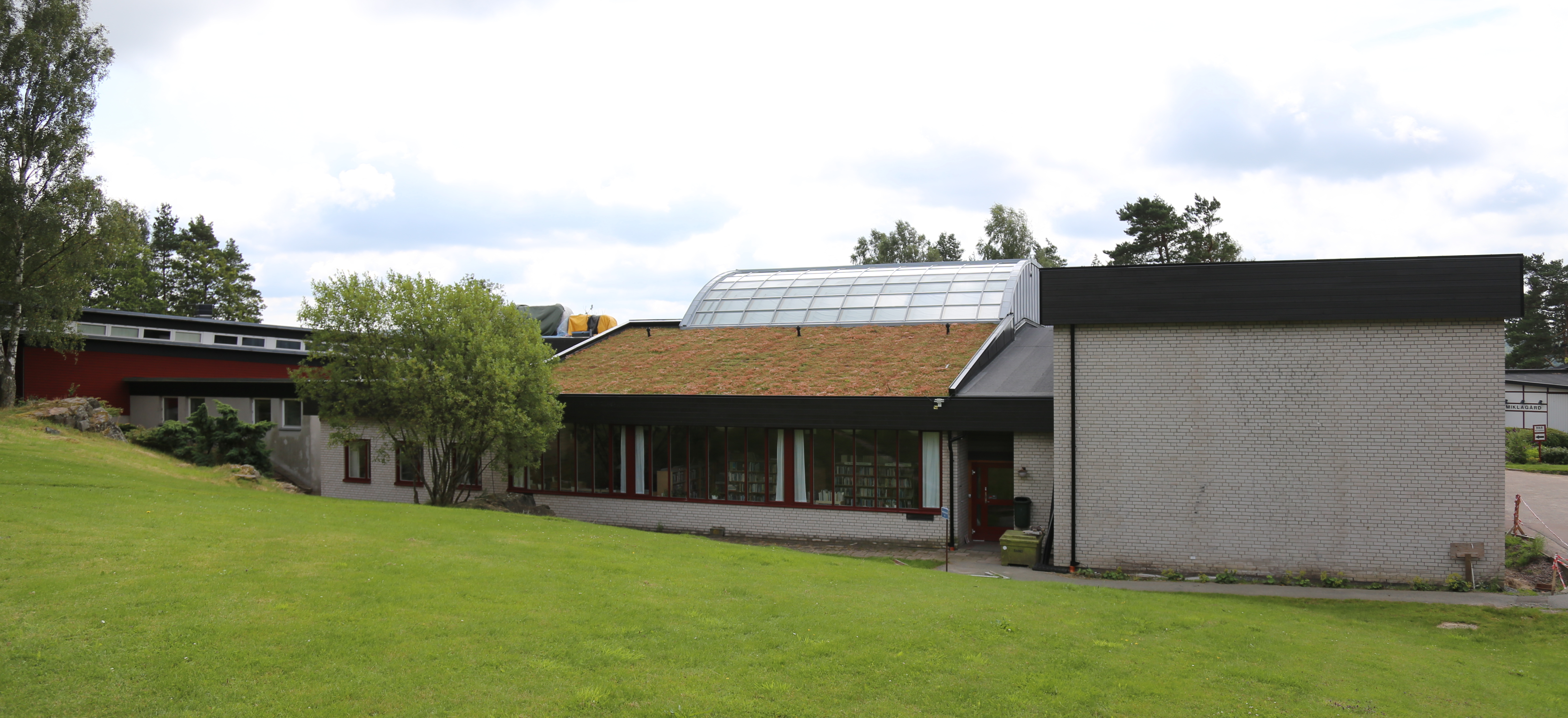 Huvudbyggnaden på Nordiska folkhögskolan i Kungälv.